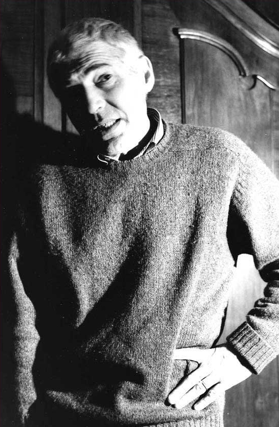 Guido Crepax, il creatore del fumetto Valentina, in un ritratto fotografico di Joe Zattere (Fumetti d'Italia)